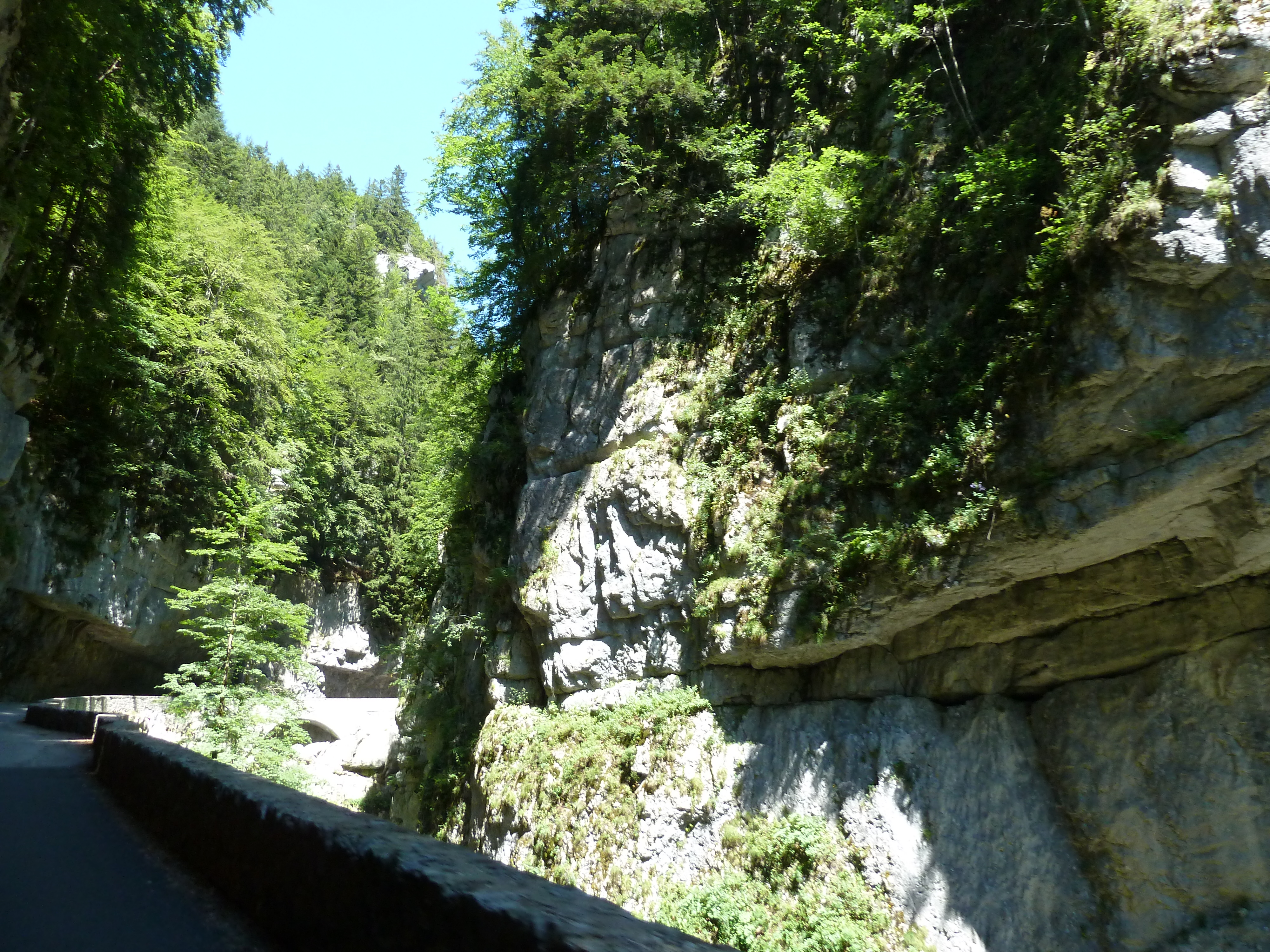 Les gorges de la Bourne, à Villard-de-Lans (38).